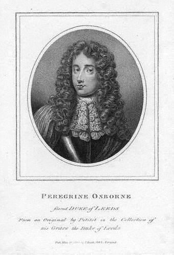 Peregrine Osborne (1658-29) 2nd Duke of Leeds